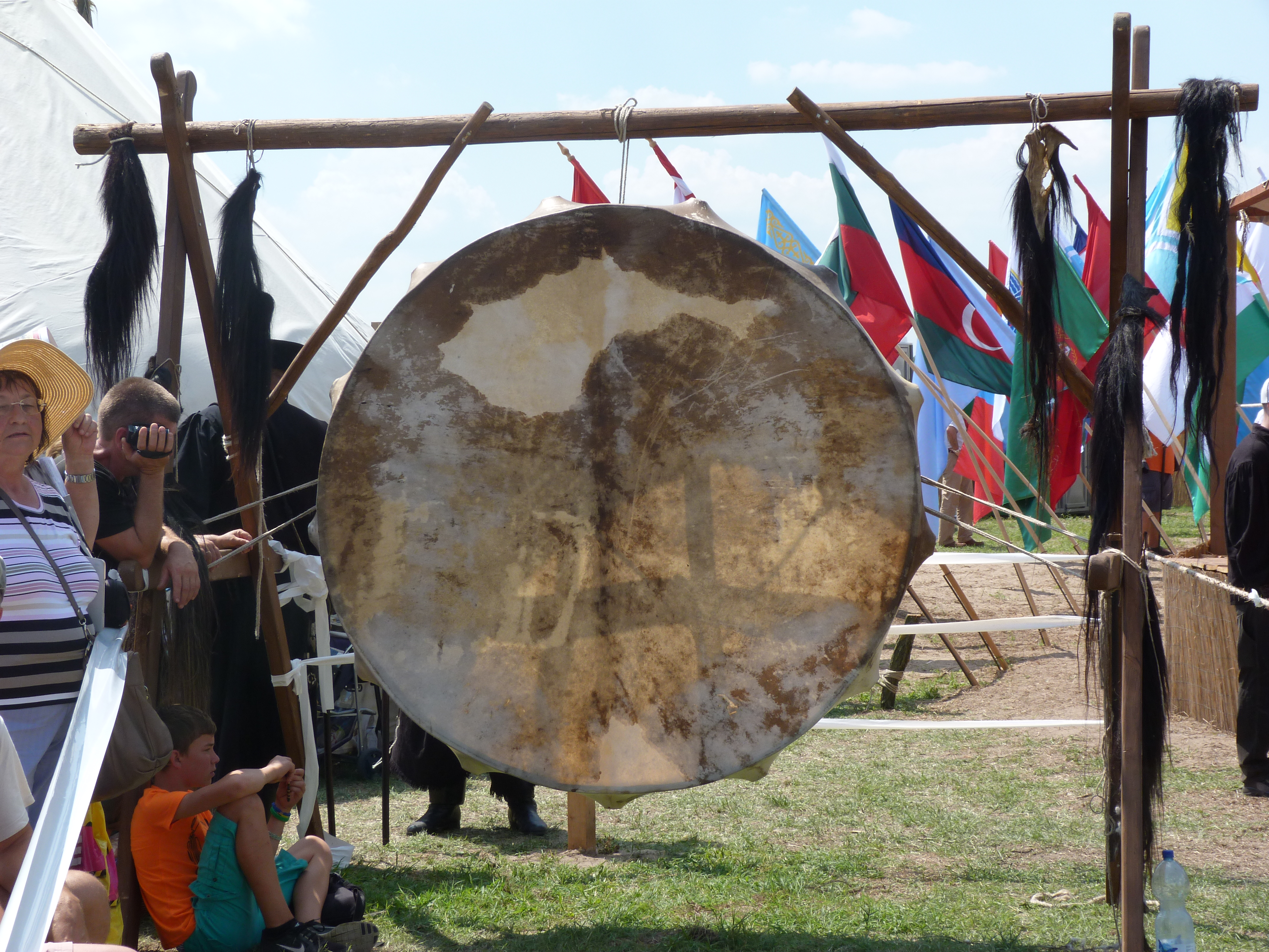 A felvétel 2014. augusztus 9-én, szombaton készült Bugacon. Kurultáj, magyar törzsi gyűlés. ©© Derzsi Elekes Andor, Budapest 2014, You are authorised to use this photo under Creative Commons – even for commercial, for profit purposes. The photo must be attributed to Derzsi Elekes Andor. All of the photos and vids in the Metapolisz DVD line are under Creative Commons and can be used even for commercial – for profit – purposes. Recommended Citation Derzsi Elekes Andor: Metapolisz DVD line